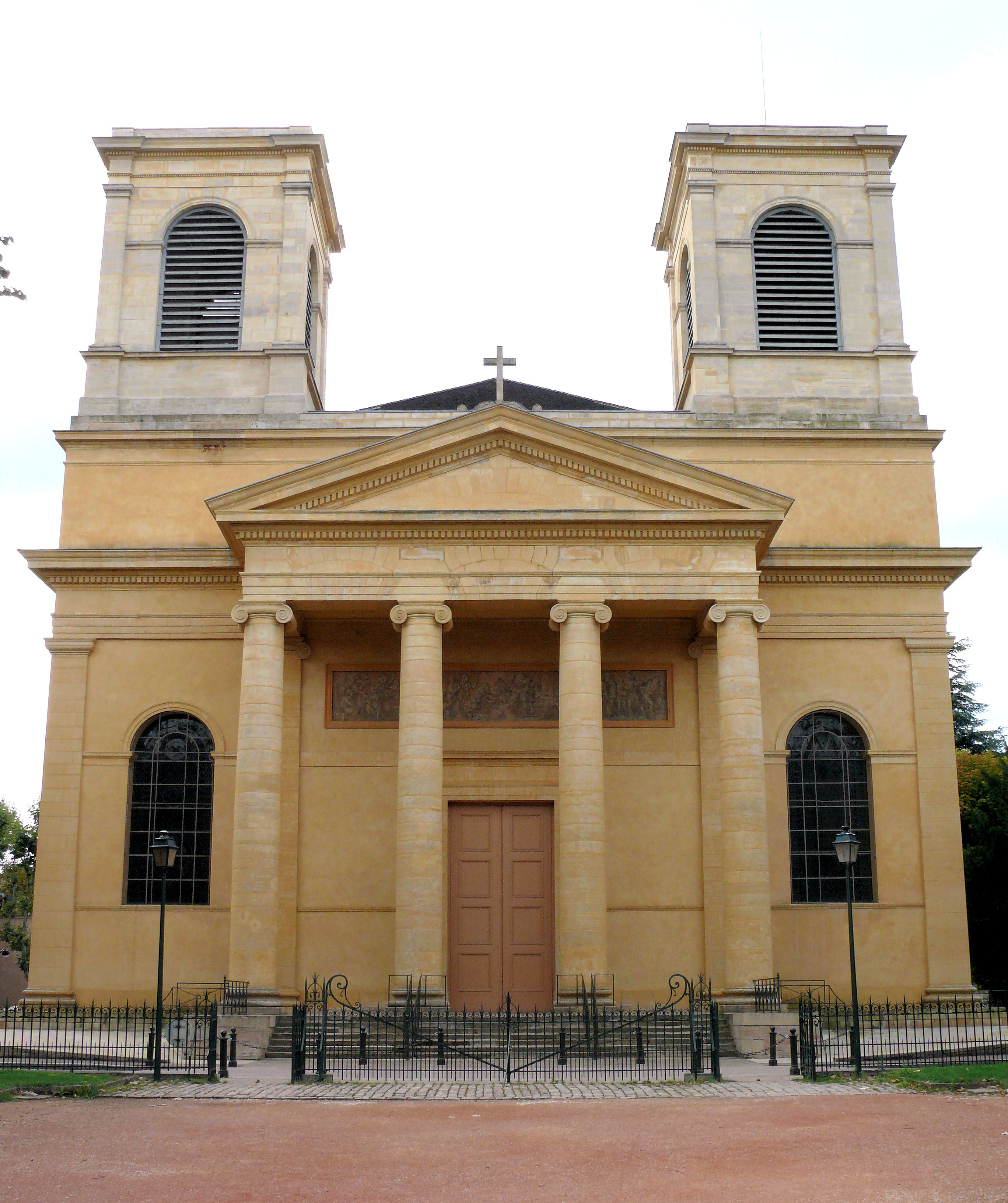 Mâcon - Église Saint-Vincent - Façade principale